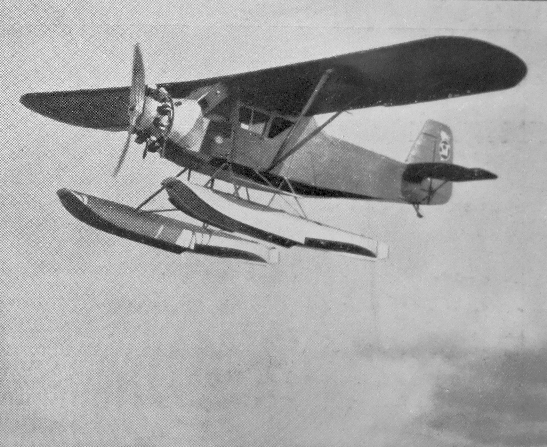 Walter Mars a ASJA L1 Viking (1931)